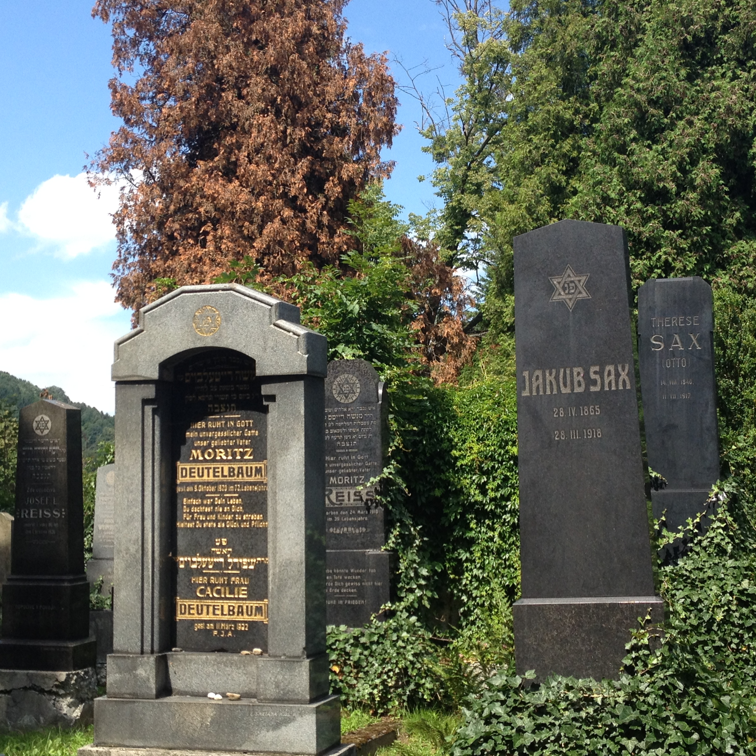 zidovsky hrbitov ve Vsetine